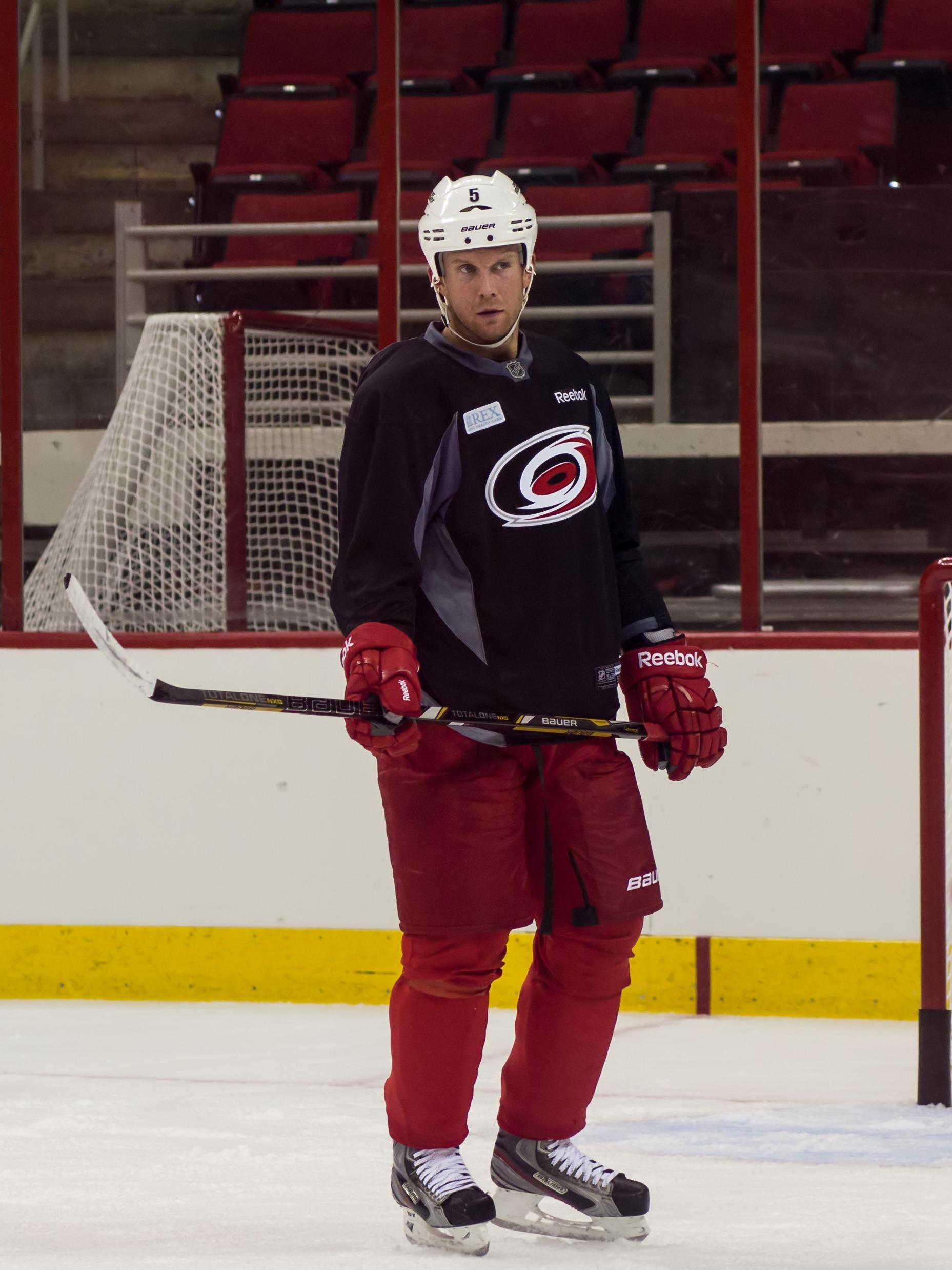 Mike Komisarek, American ice hockey defenseman